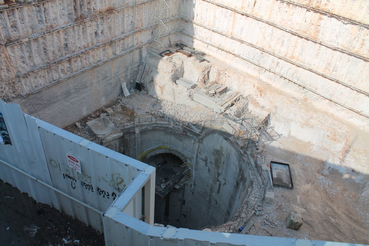 החפירות לקו המהיר